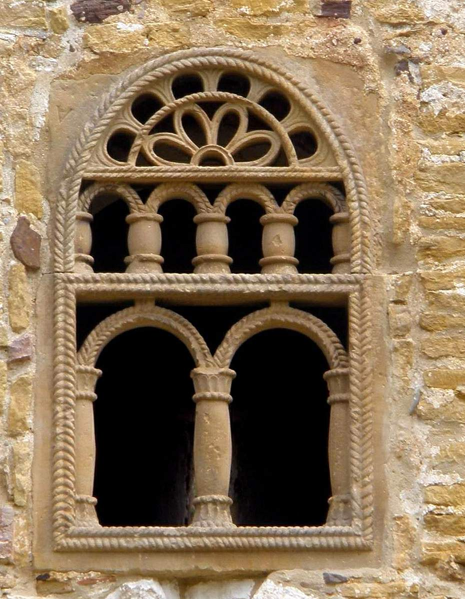 Iglesia prerrománica asturiana de San Miguel de Lillo (Oviedo)